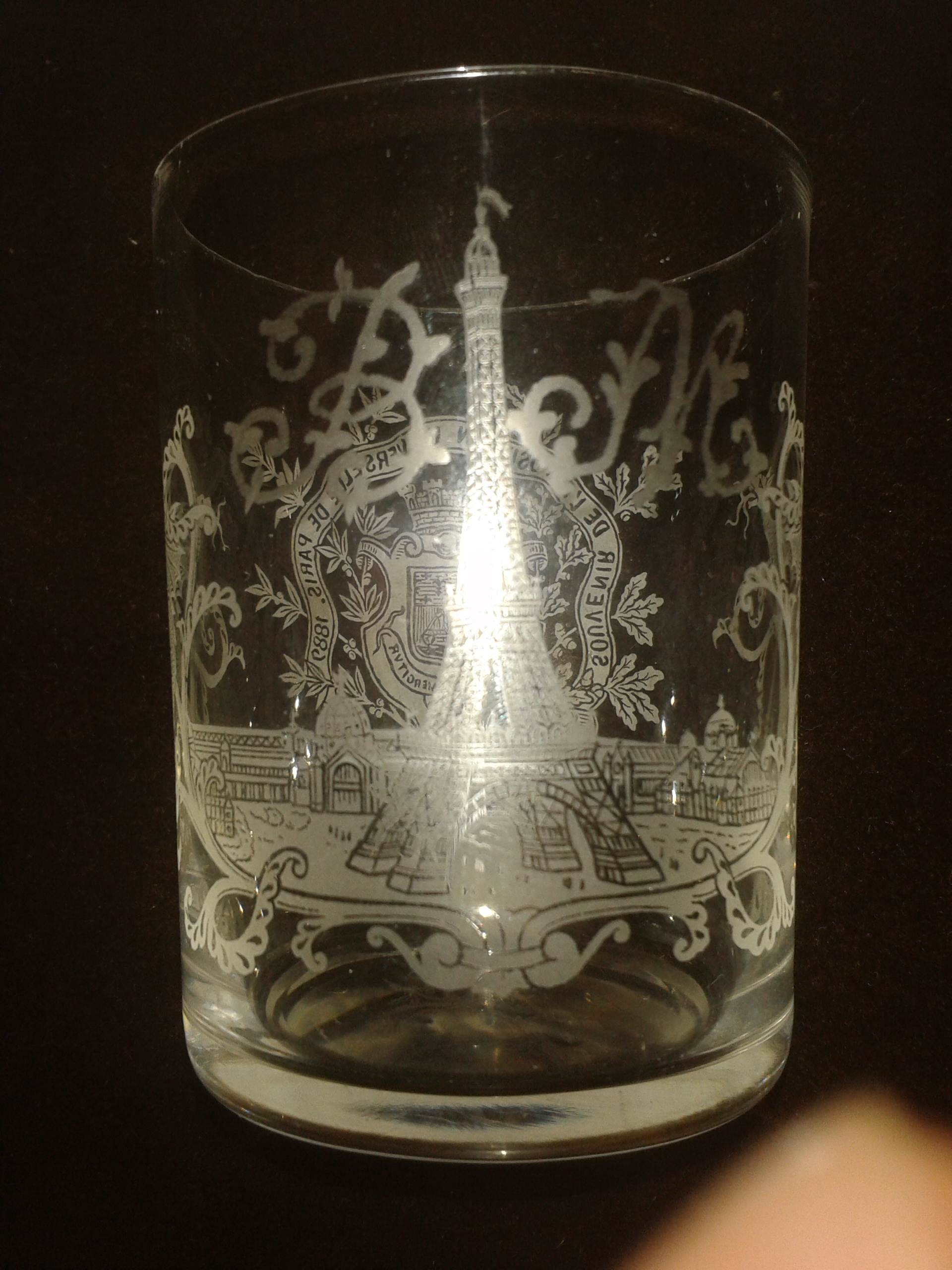 Vaso de cristal como souvenir de la Exposición Universal de París de 1889 cuando se inauguró la Torre Eiffel